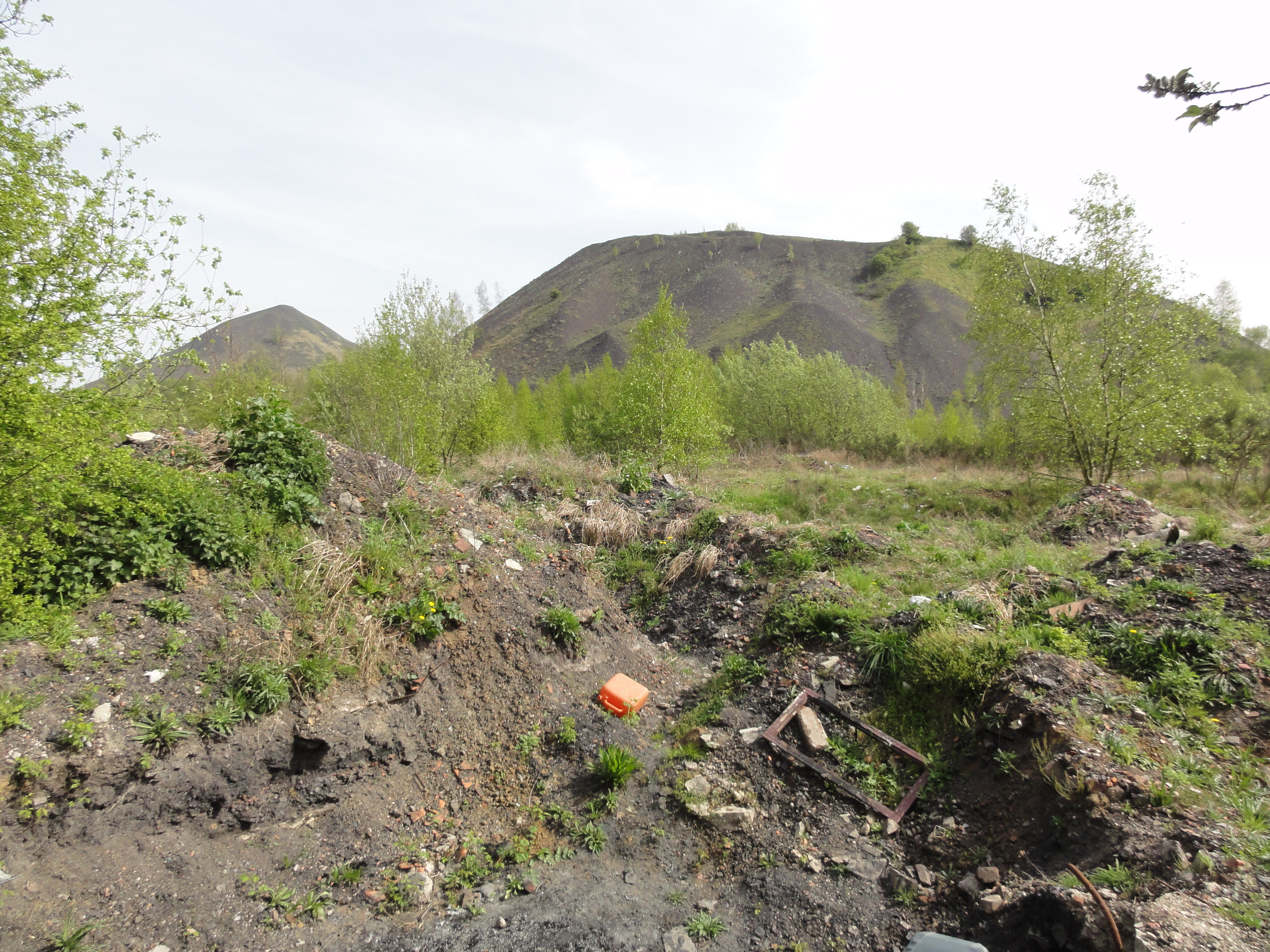 Terril n° 92 dit Lavoir Hénin Ouest, fosse n° 2 - 2 bis de la Compagnie des mines de Dourges et lavoir dans le bassin minier du Nord-Pas-de-Calais, Hénin-Beaumont et Dourges, Pas-de-Calais, Nord-Pas-de-Calais, France. Le terril no 92 est inscrit sur la liste du patrimoine mondial de l'Unesco le 30 juin 2012 et y constitue en partie le site no 46.